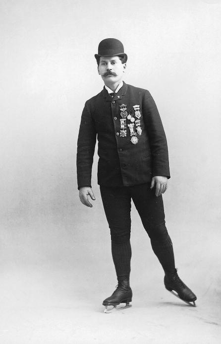 Photographie - Louis Rubenstein en train de patiner, Montréal, QC, 1893 - Plaque sèche à la gélatine. Louis Rubenstein, (né à Montréal en 1862 - décédé à Montréal en 1931) fut champion canadien de patin artistique en 1883 et champion du monde lors du championnat de 1890 en Russie.